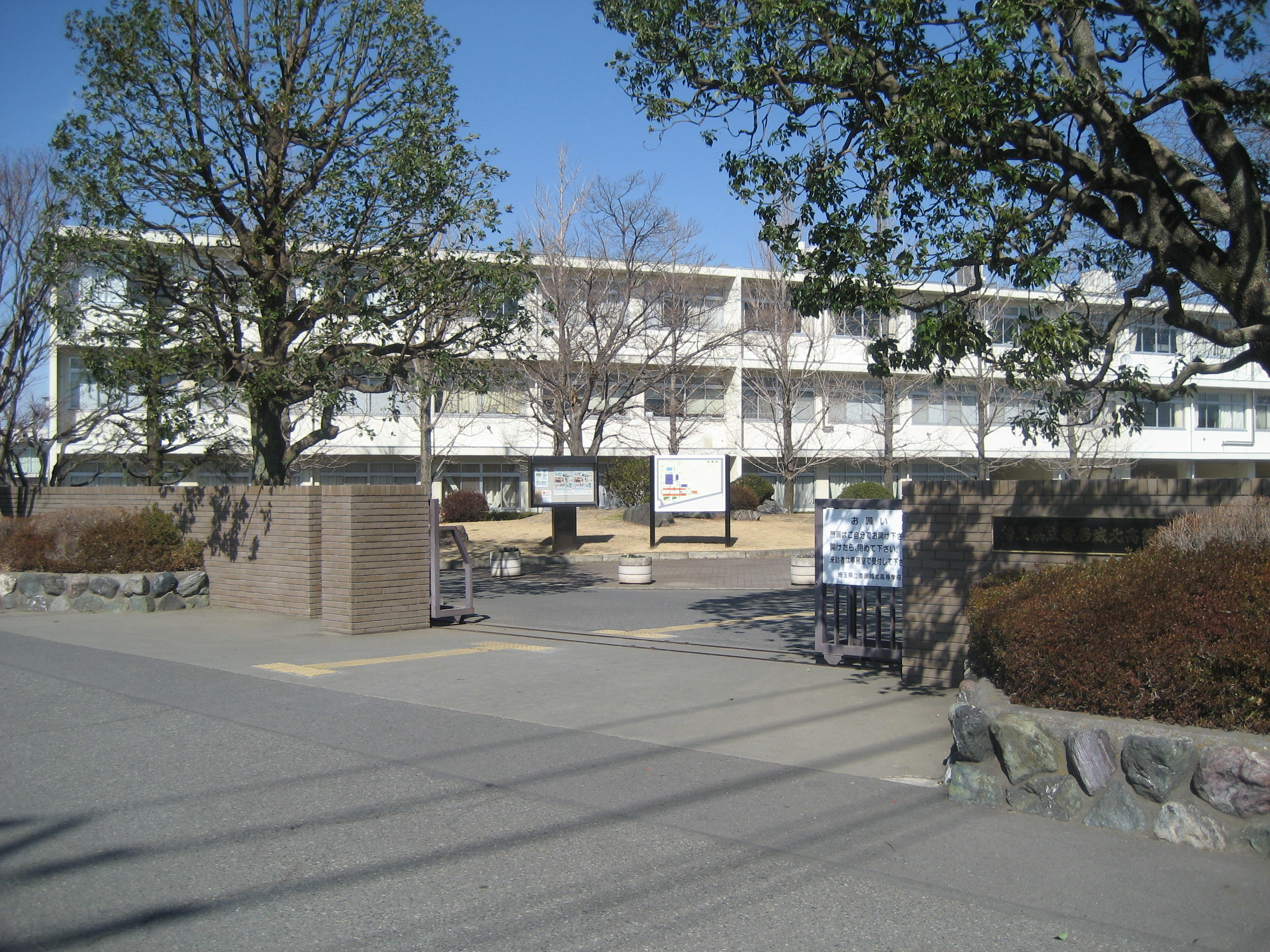 埼玉県立寄居城北高等学校（正門付近を撮影）